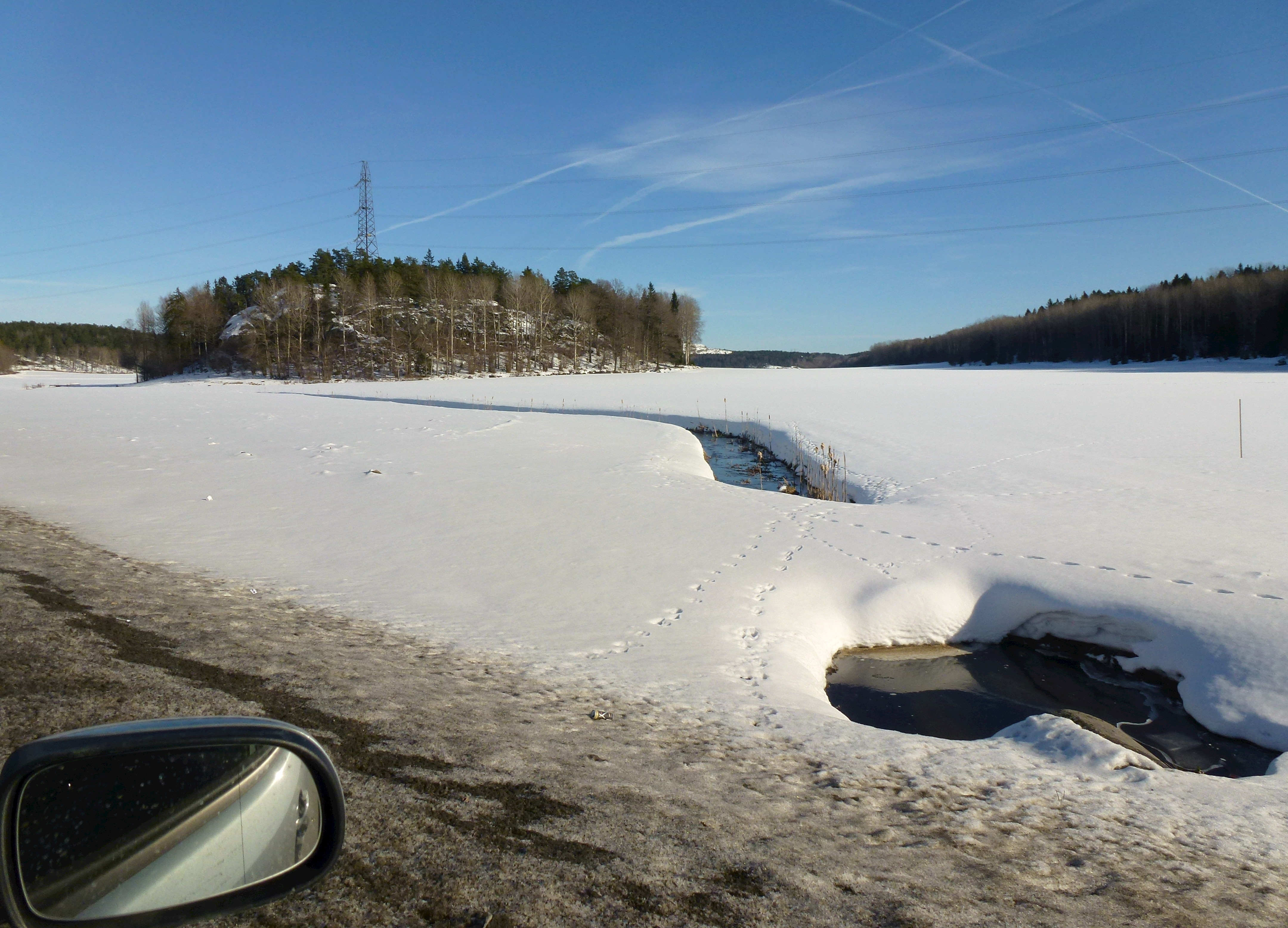 Hågelbyleden vid Nibble hage med Älvestaån